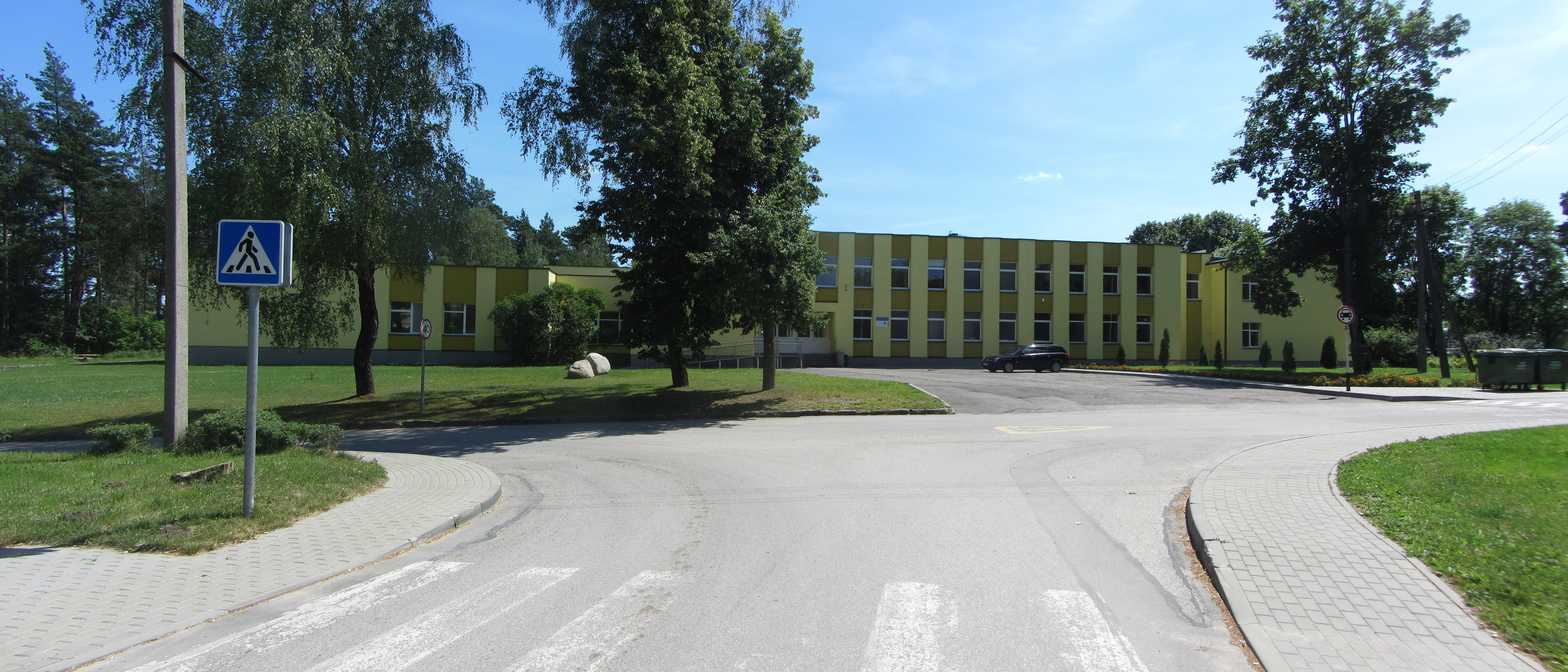 Matuizos, Lithuania